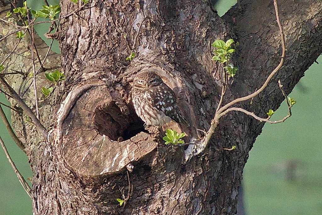 Steinkauz beim Sonnenbad auf einer Streuobstwiese, Brutvogel im NSG Bislicher Insel